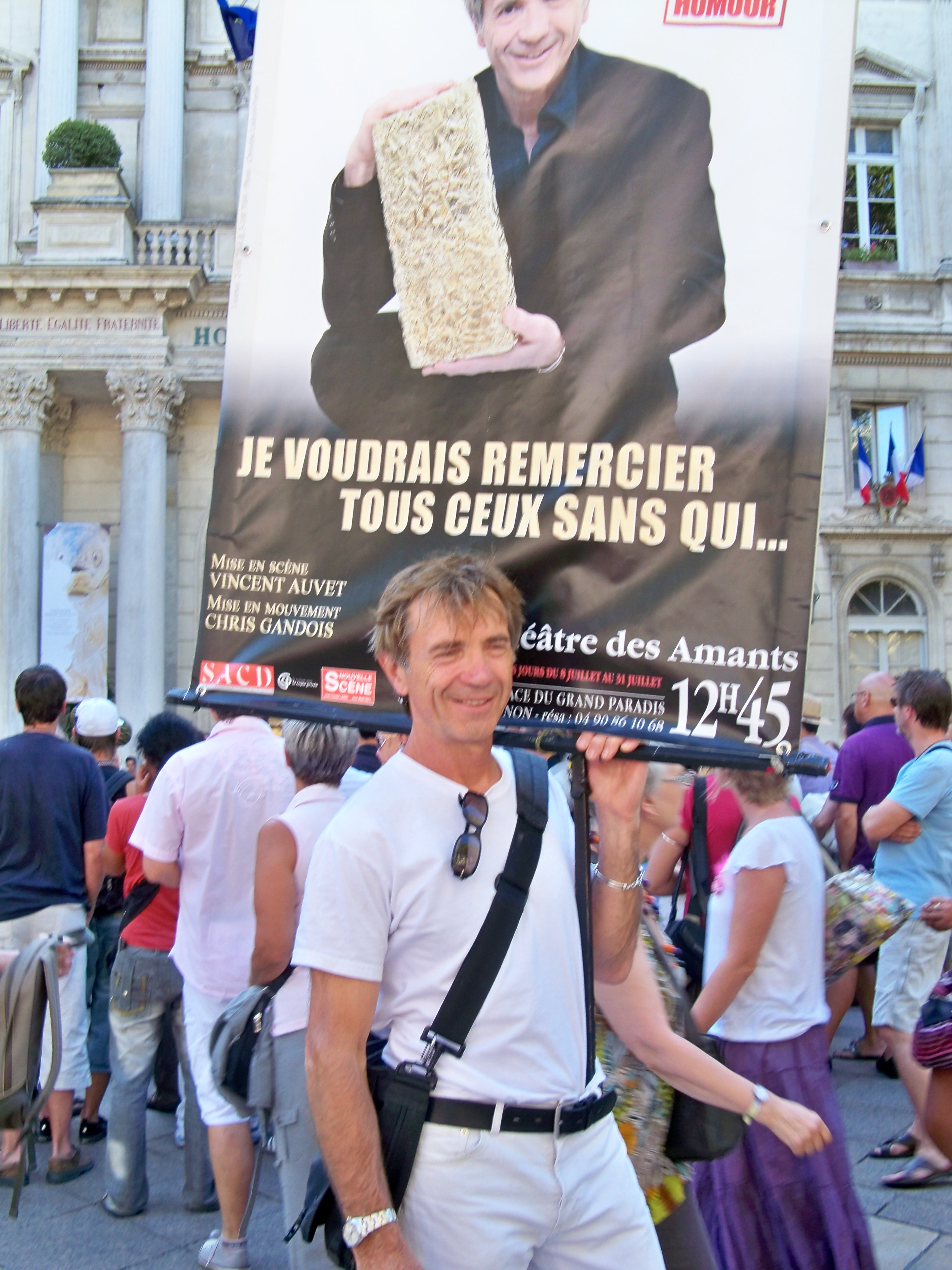 Roger Miremont en promo pour le OFF du Festival d'Avignon